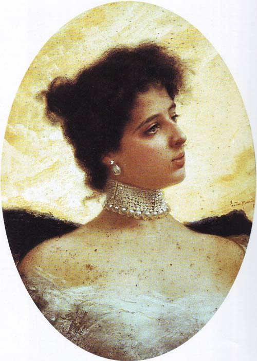 Donna Franca Florio, ritratto di Ettore De Maria Bergler del 1893